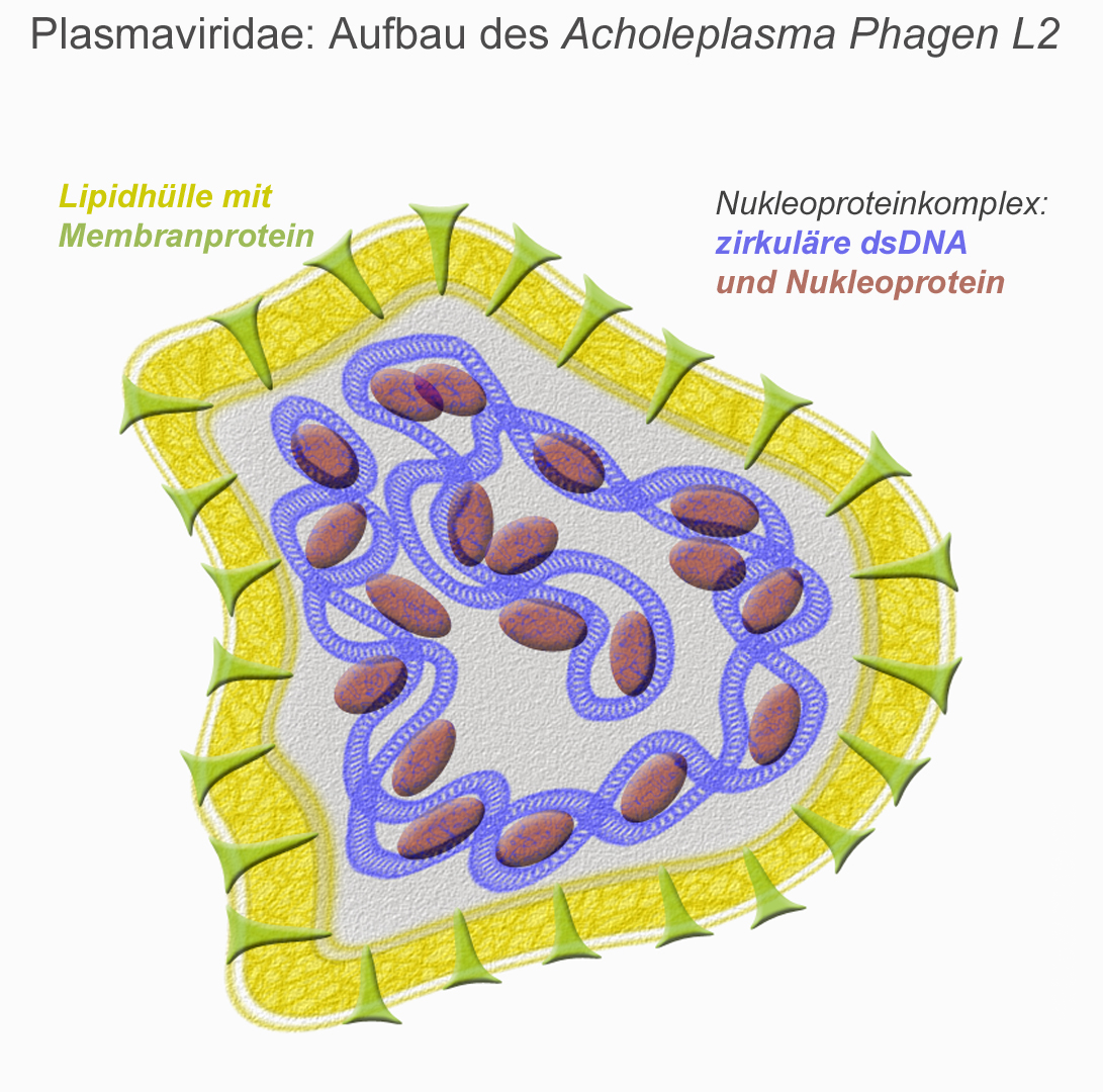 Schematischer Aufbau der Plasmaviridae am Beispiel des Acholeplasma-Phagen L2